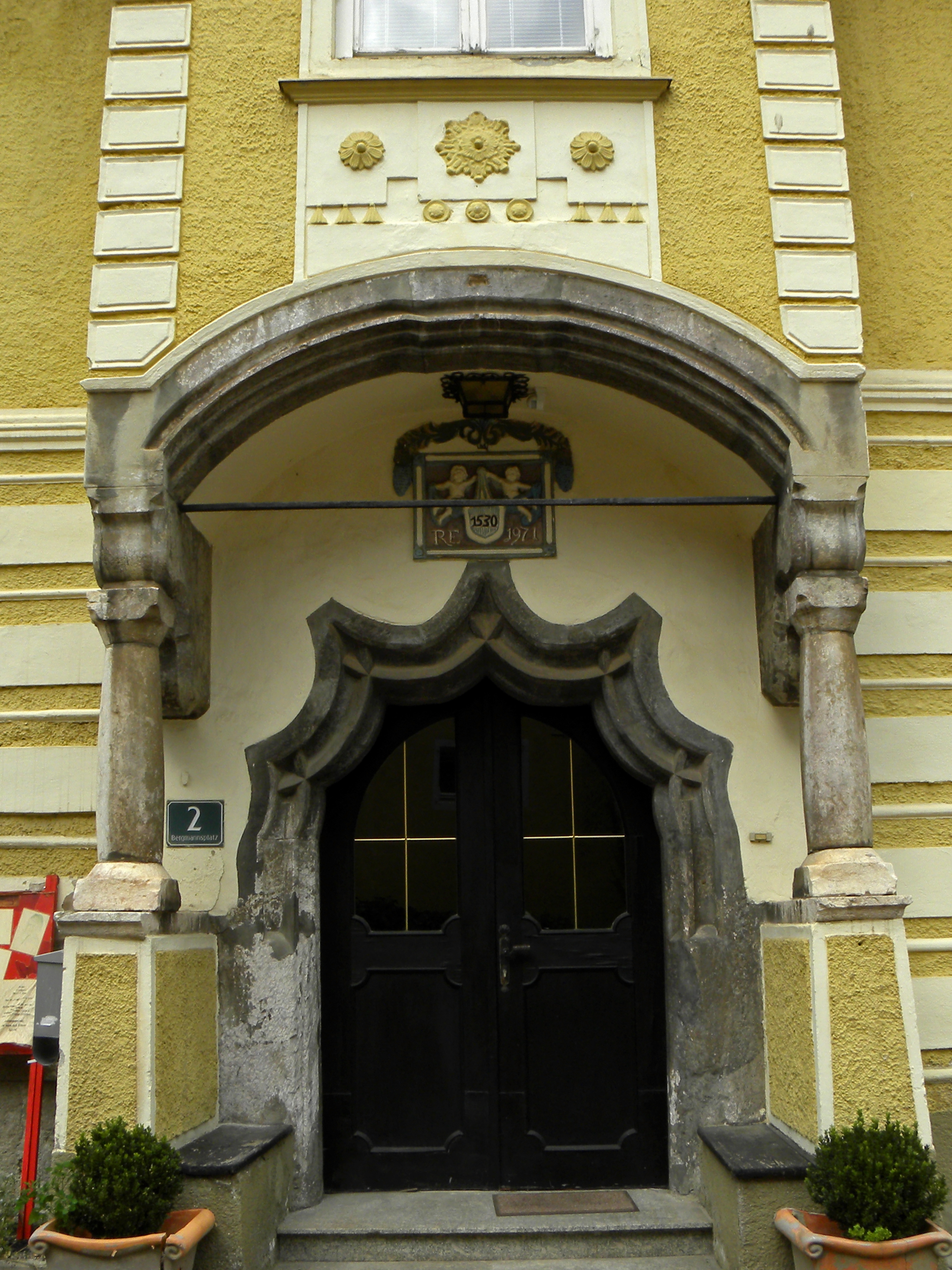 Das ehemalige Büchsenmacherhaus in der Stadt Eisenerz (Steiermark, Österreich) ist ein bemerkenswerter spätgotischer Bau aus der ersten Hälfte des 16. Jahrhunderts. Fassadengliederung und Dekor in Empireformen, vermutlich aus der Zeit um 1900. Das spätgotische Hauptportal hat zweifach gekehlte Gewände, Vorhangbogen und Verstäbung, sowie ein Bindenschild mit der Bezeichnung 1530. Darüber befindet sich ein auf Säulen und Konsolen gestützter Erker. Das spätgotische Nebenportal hat einen fünfeckigen Abschluß und Verstäbungen. Nicht sichtbar sind an der Gartenseite des Haupttraktes befindliche zweigeschoßige Säulenarkaden aus dem 16. Jahrhundert, sowie eine im Flügel kreuzgewölbte Halle, die einen Mittelpfeiler besitzt.